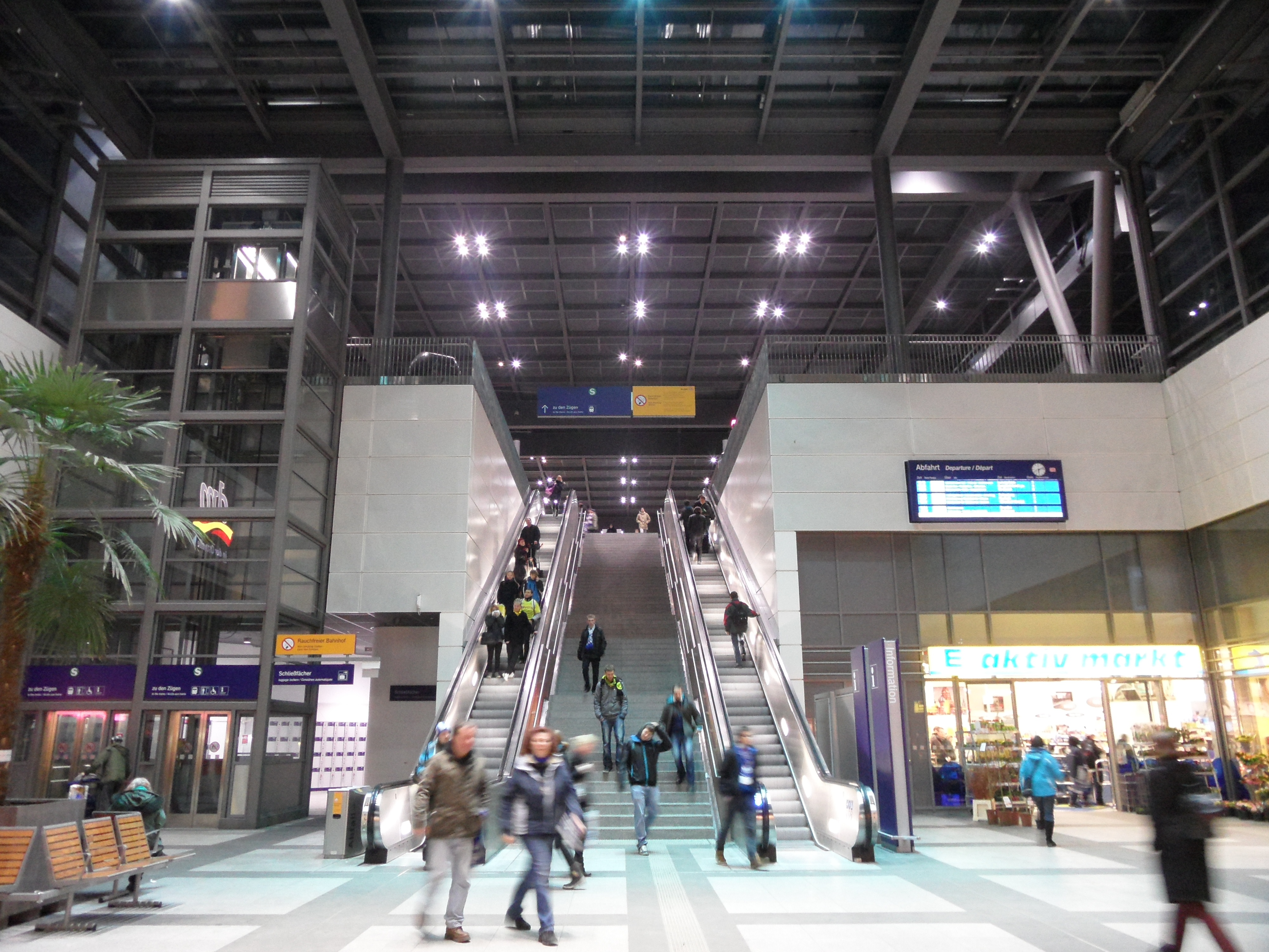 Berlin - Bahnhof Südkreuz - Westhalle